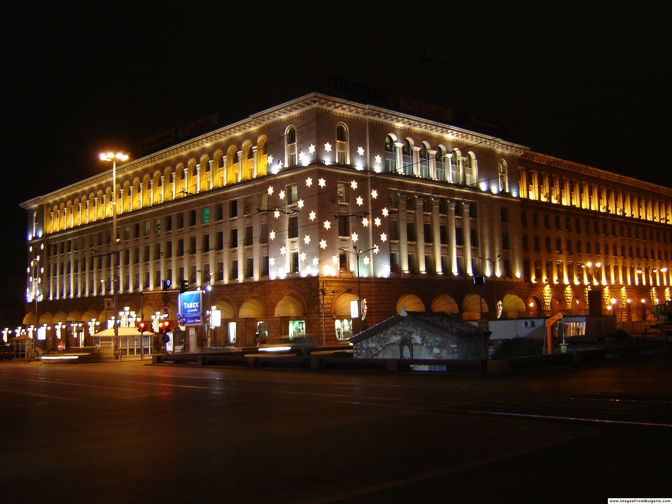 TZUM department store, Sofia